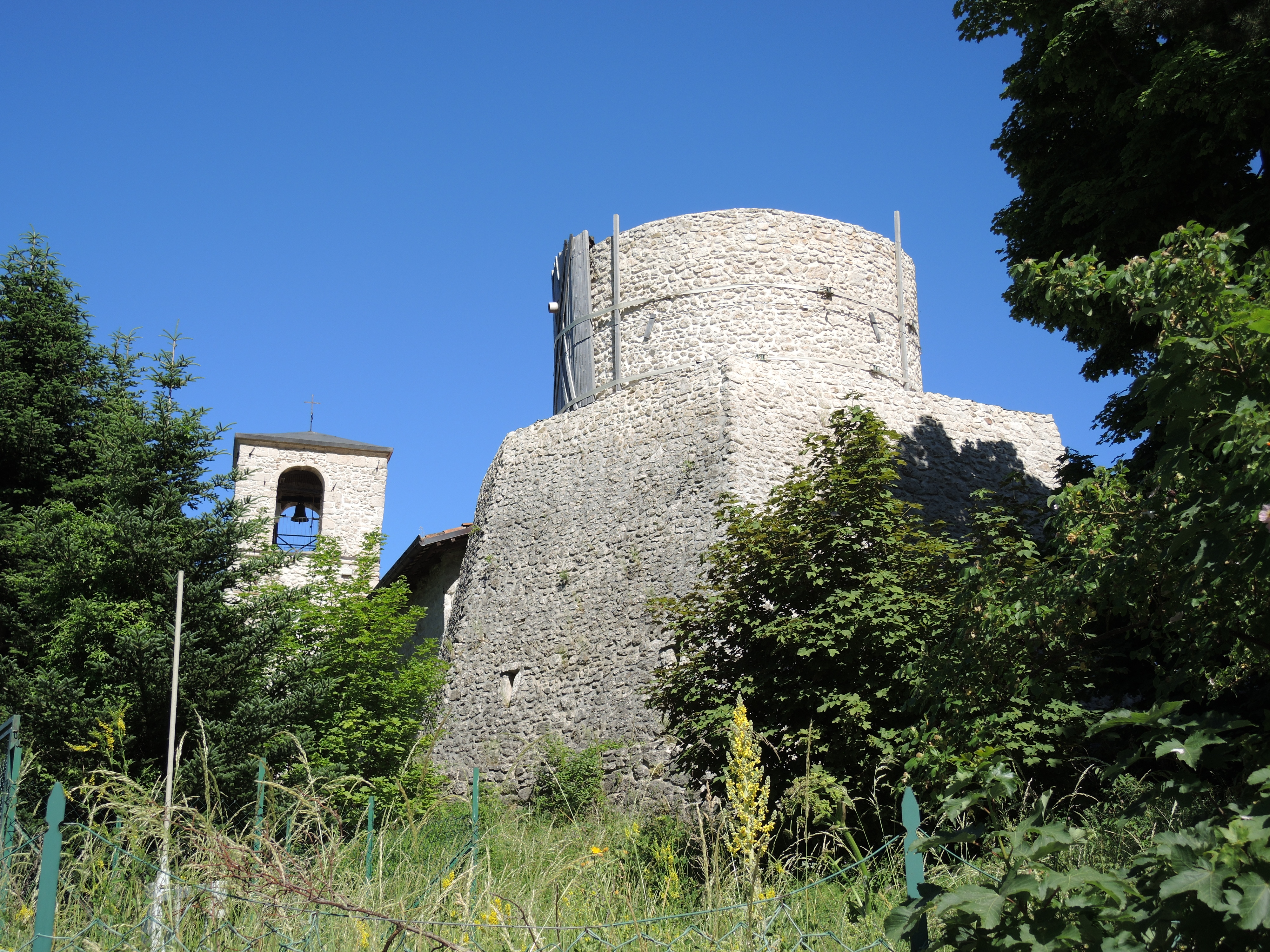 Rocca di Cambio (AQ): Collegiata di San Pietro